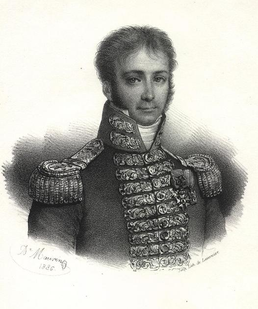 Captain Bernard Dubourdieu, killed during the Battle of Lissa, on 13 march 1811. He wears the medals of the Legion of honour and the Crown of Iron.